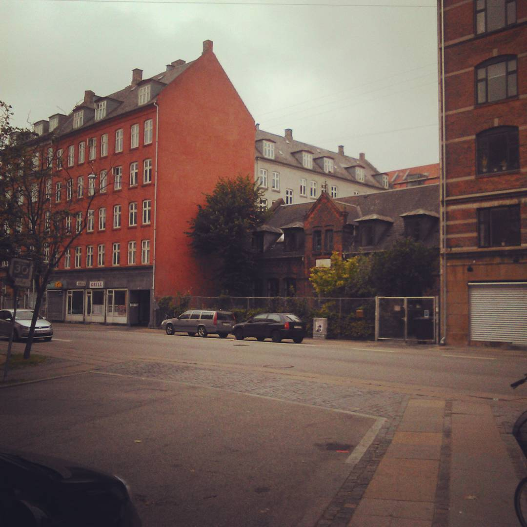 Prinsesse Thyras Asyl